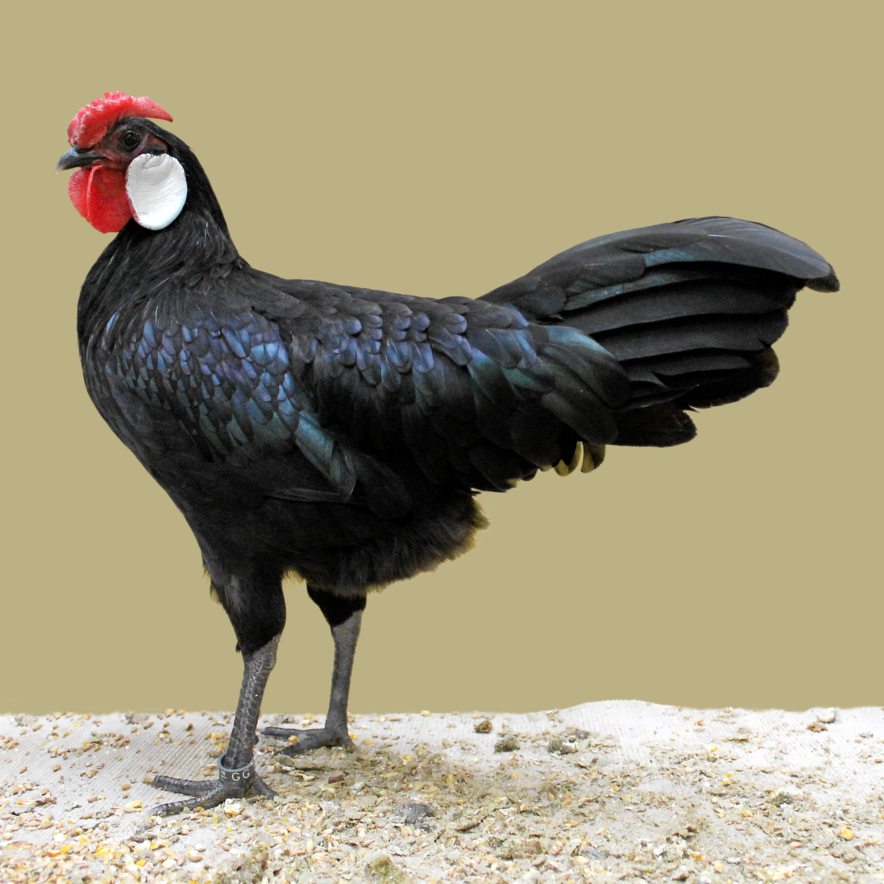 Minorka, rosenkämmig